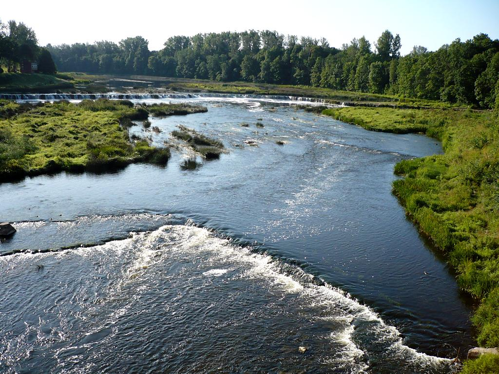 Venta pie Kuldīgas 2009-08-09